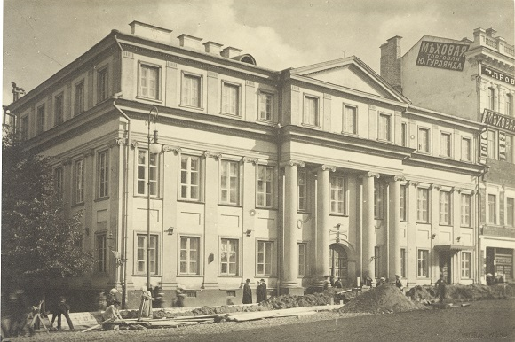 Беларуская (тарашкевіца): Вільня (Vilnia), вуліца Вялікая (vulica Vialikaja), палац Абрамовічаў (Abramovič)